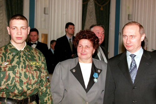 МОСКВА, КРЕМЛЬ. Церемония вручения государственных наград. С многодетной матерью 14 детей, награжденной орденом Почета, Галиной Найденковой и одним из ее старших сыновей.